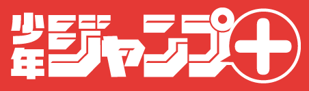 Logo de Shōnen Jump+